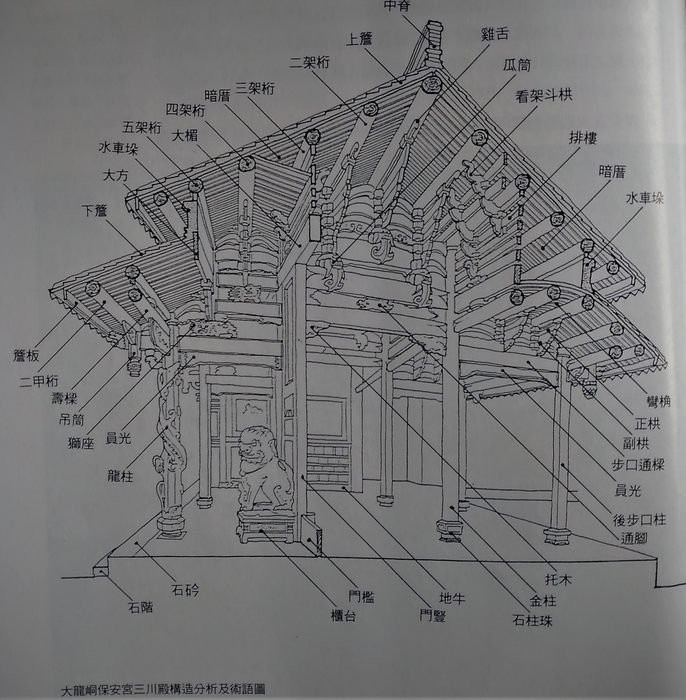 中文（台灣）: 李乾朗 編著，大龍峒保安宮建築圖